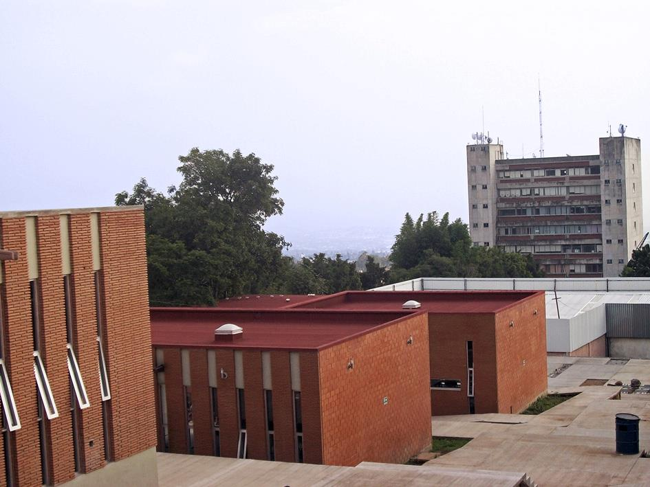 Al fondo la rectoría de la Universidad Autónoma del Estado de Morelos (UAEM) y la Facultad de Artes (Cuernavaca, Morelos, México)